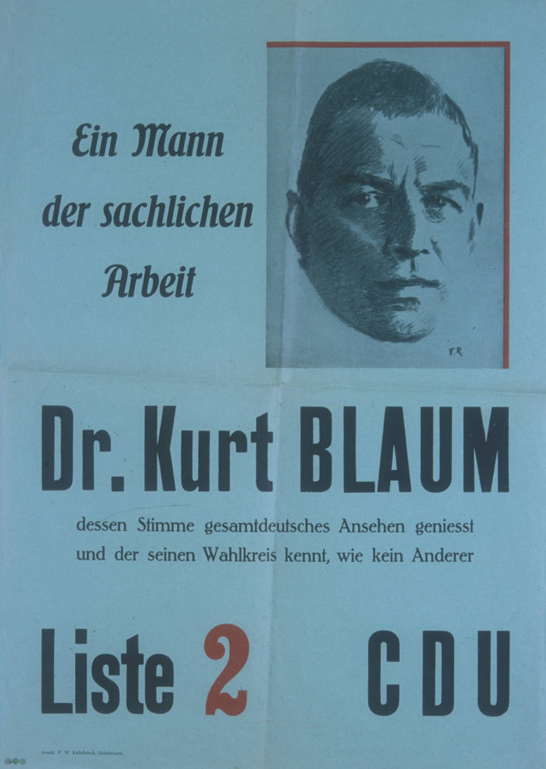 Ein Mann der sachlichen Arbeit Dr. Kurt Blaum dessen Stimme gesamtdeutsches Ansehen geniesst und der seinen Wahlkreis kennt, wie kein Anderer Liste 2 CDU Abbildung: Porträtzeichnung Plakatart: Kandidaten-/Personenplakat mit Porträt Drucker_Druckart_Druckort: F.W. Kalbfleisch, Gelnhausen Objekt-Signatur: 10-007 : 2 Bestand: Landtagswahlplakate Hessen (10-007) GliederungBestand10-18: Landtagswahlplakate Hessen (10-007) » CDU Lizenz: KAS/ACDP 10-007 : 2 CC-BY-SA 3.0 DE